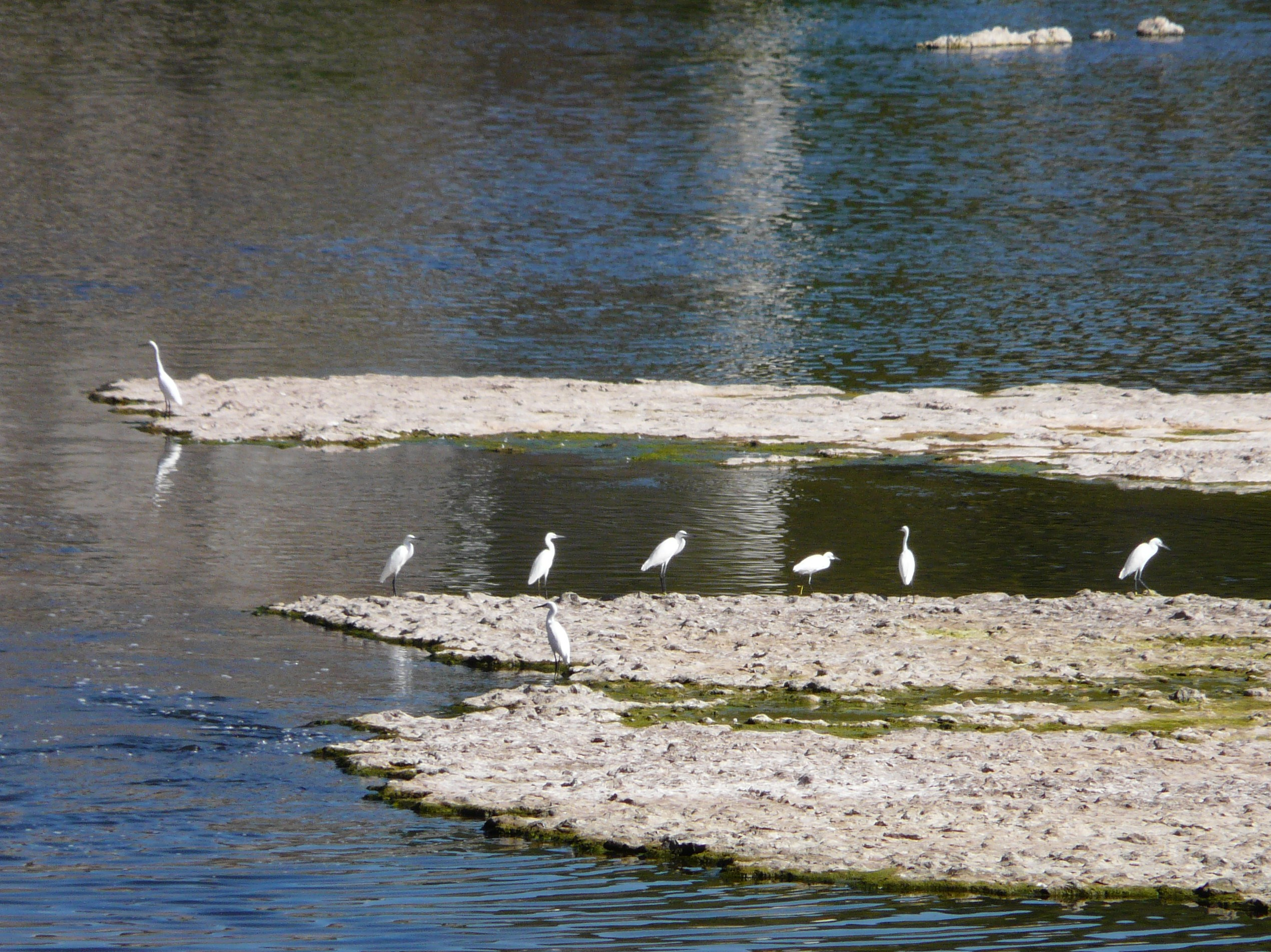 Oiseaux sur la Dordogne en aval du barrage de Mauzac, Mauzac-et-Grand-Castang, Dordogne, France.